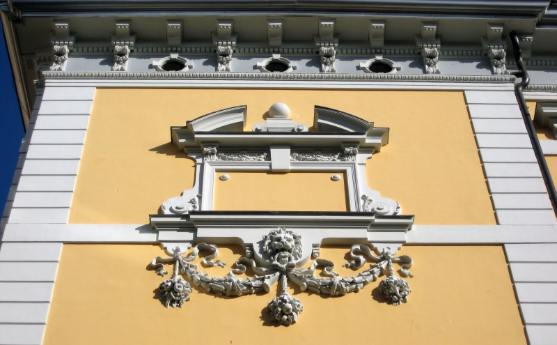 detalj na gimnaziji Andrije Mohorovičića u Rijeci